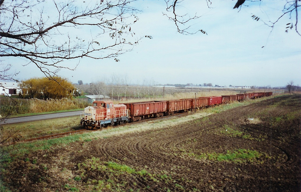 M32-es mozdony vontatta cukorrépa-szállító tehervonat halad Szentes felé a Kiskunfélegyháza–Szentes–Orosháza-vasútvonalon.